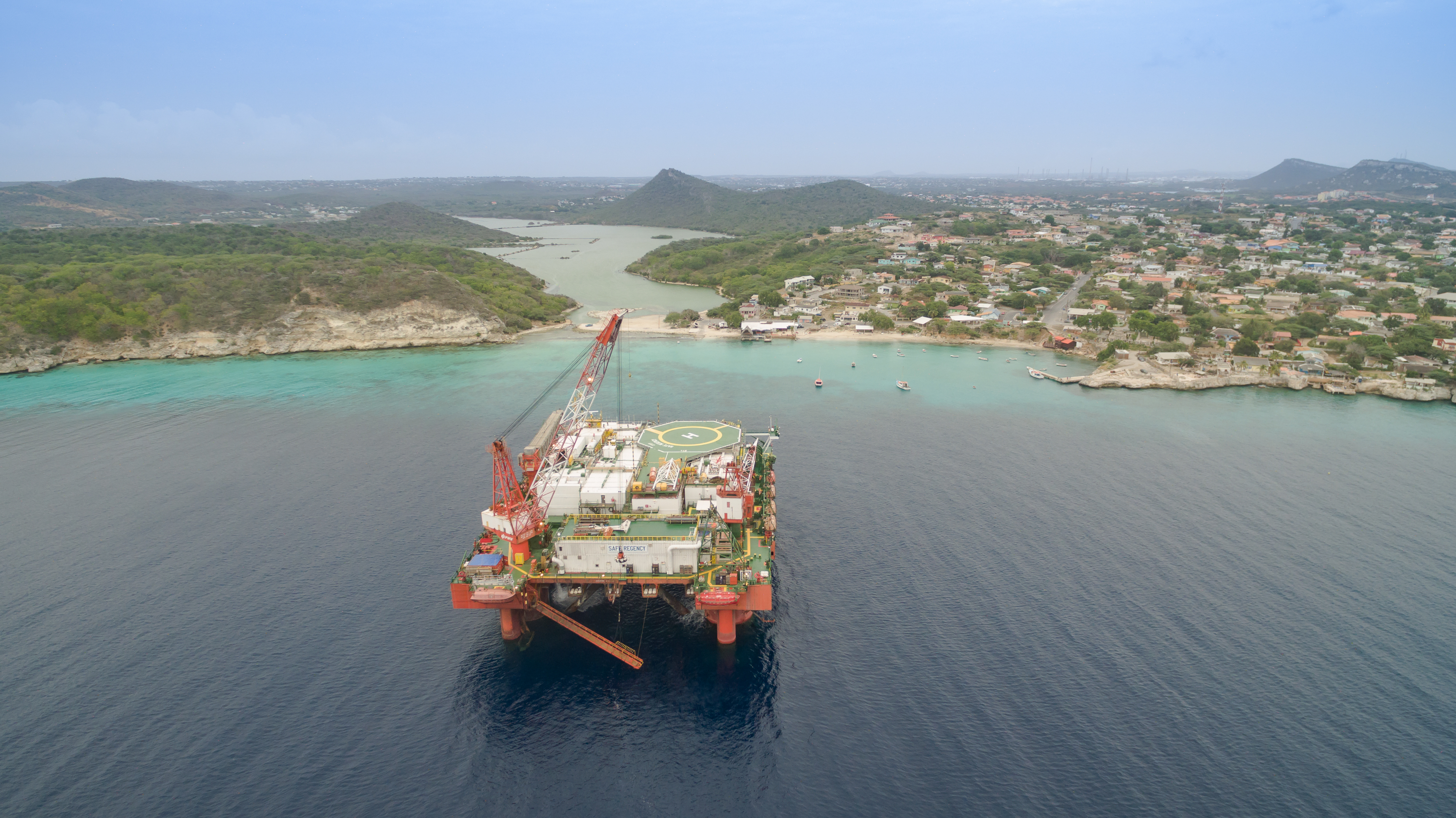 Bohrinsel Curacao Curacao